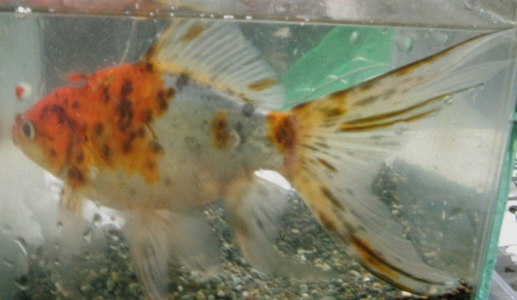 shubunkin